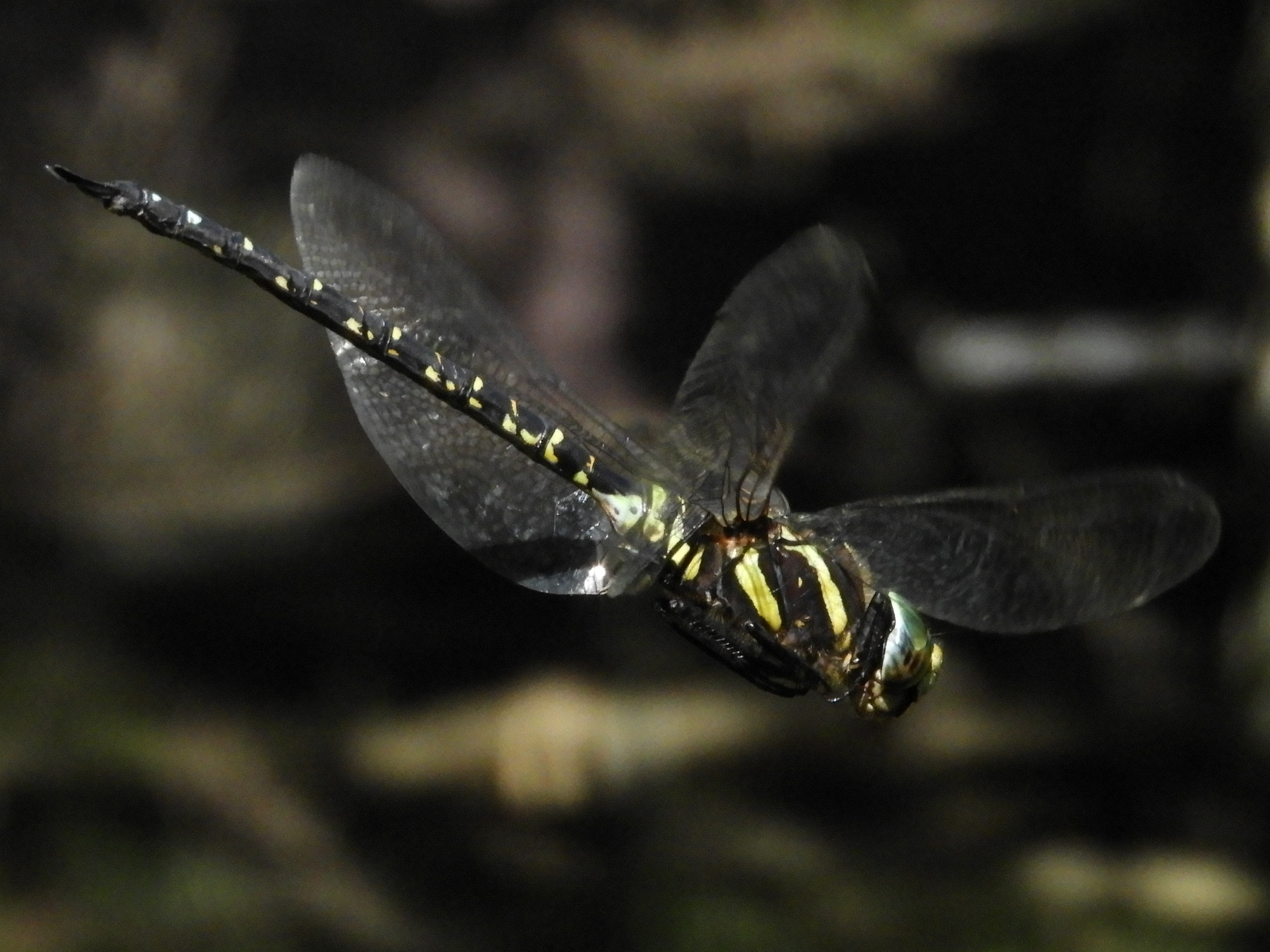 ルリボシヤンマ雄 広島県